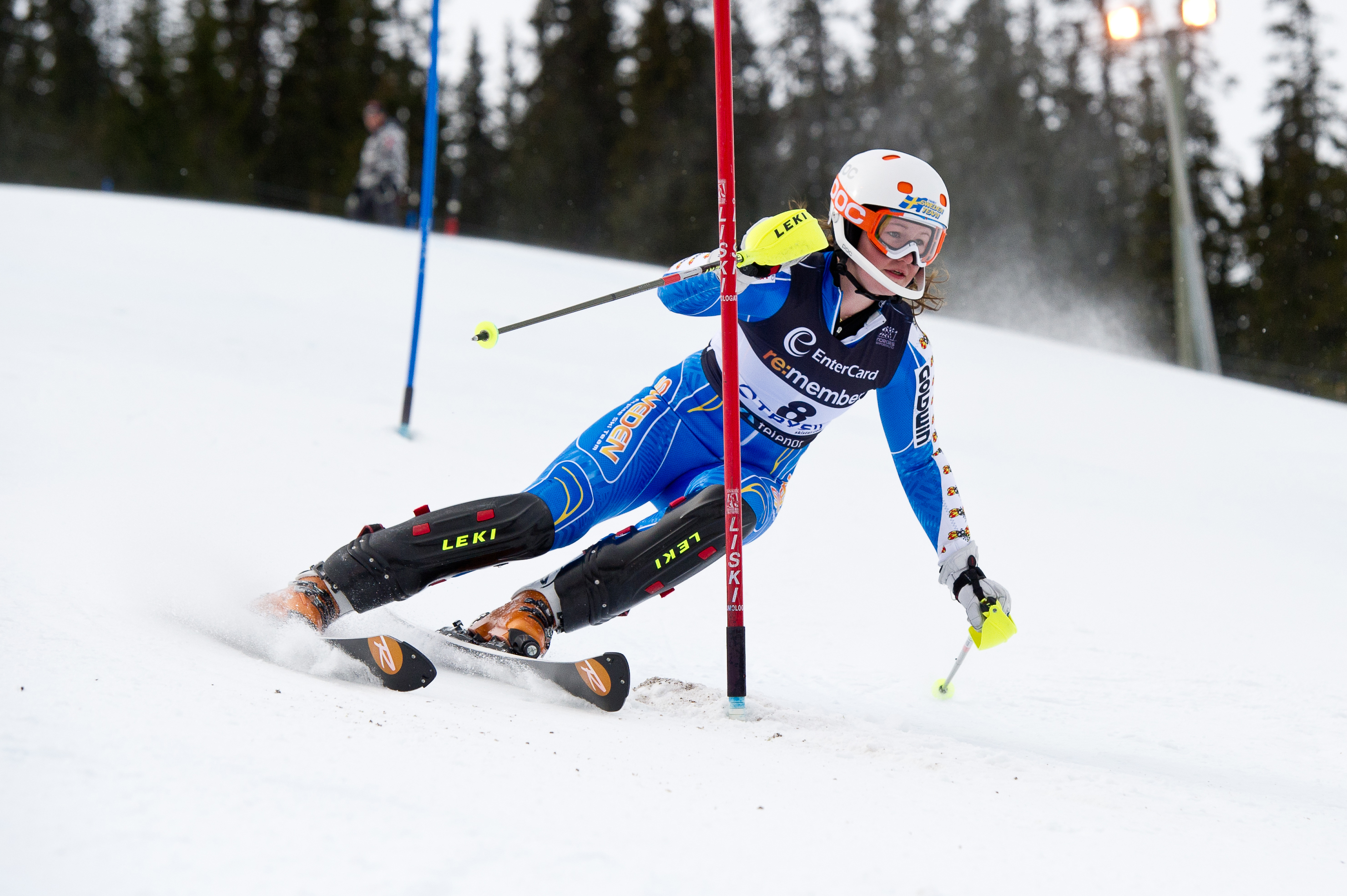 Nr. 2 Charlotta Säfvenberg (Swe) i NM i slalåm i Trysil 27. mars 2011. Foto: Ola Matsson.